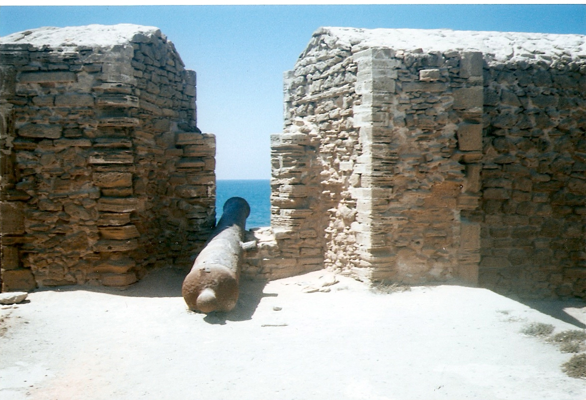 Een kanon aan de oude stadmuur van Salé